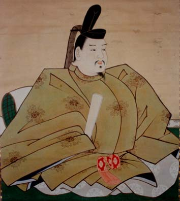 前田利長 (Maeda Toshinaga)